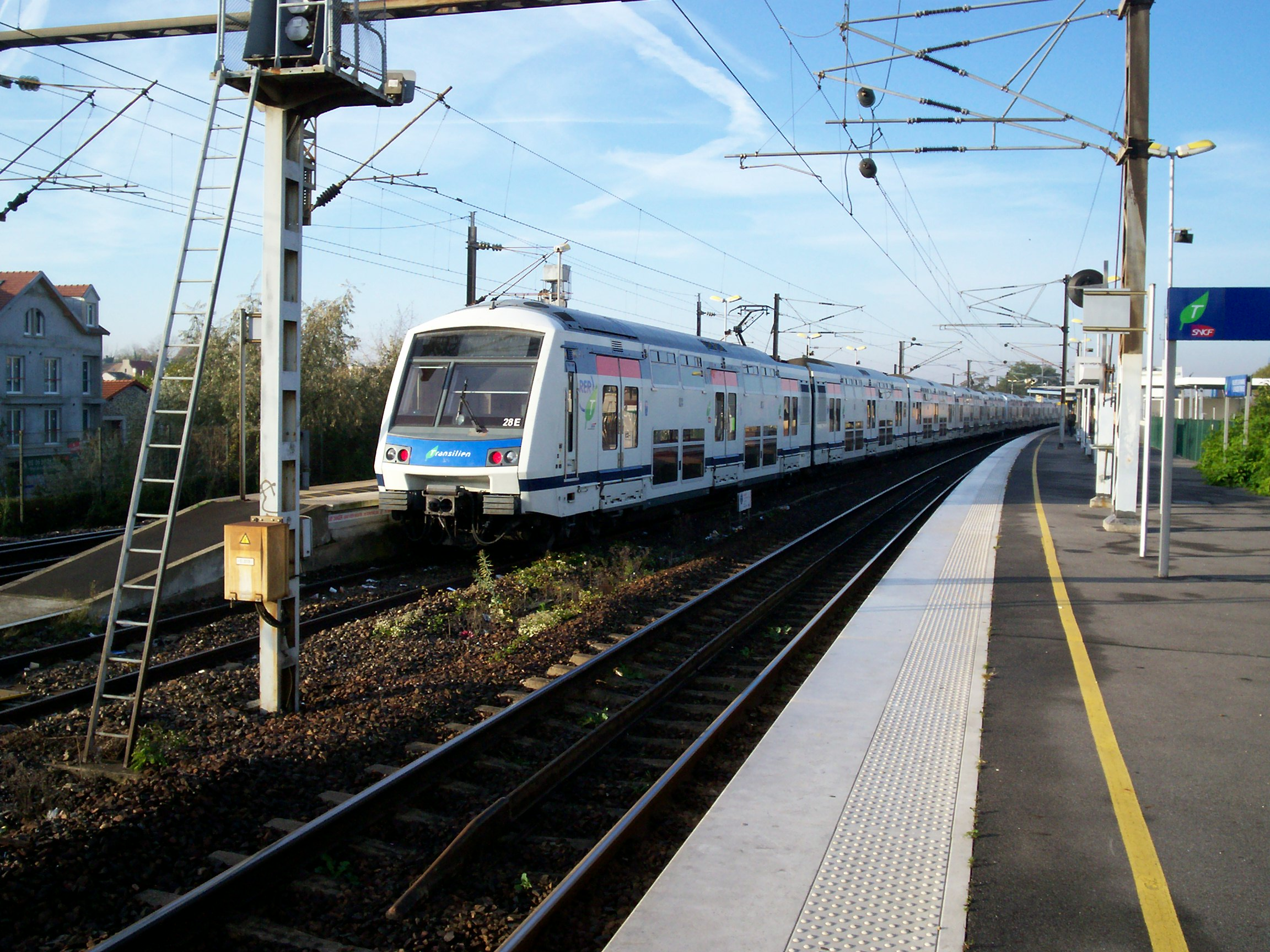 Train long VALO (à ce moment) en gare terminus de Villiers